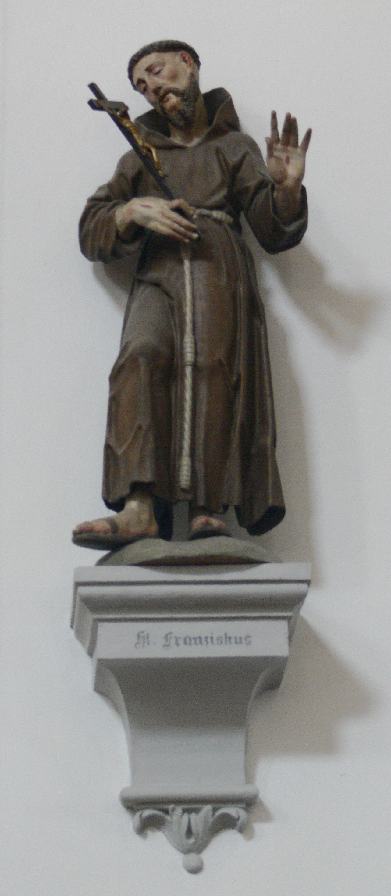 Pfarrkirche St. Martin, Aulendorf, Landkreis Ravensburg Figur „Franziskus von Assisi“, um 1630